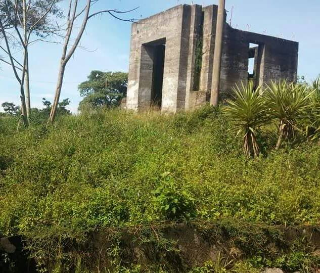 Venus in La Cumbre del Cerro Del Espiritu Santo al oeste de la ciudad de naranjo de alajuela Costa Rica